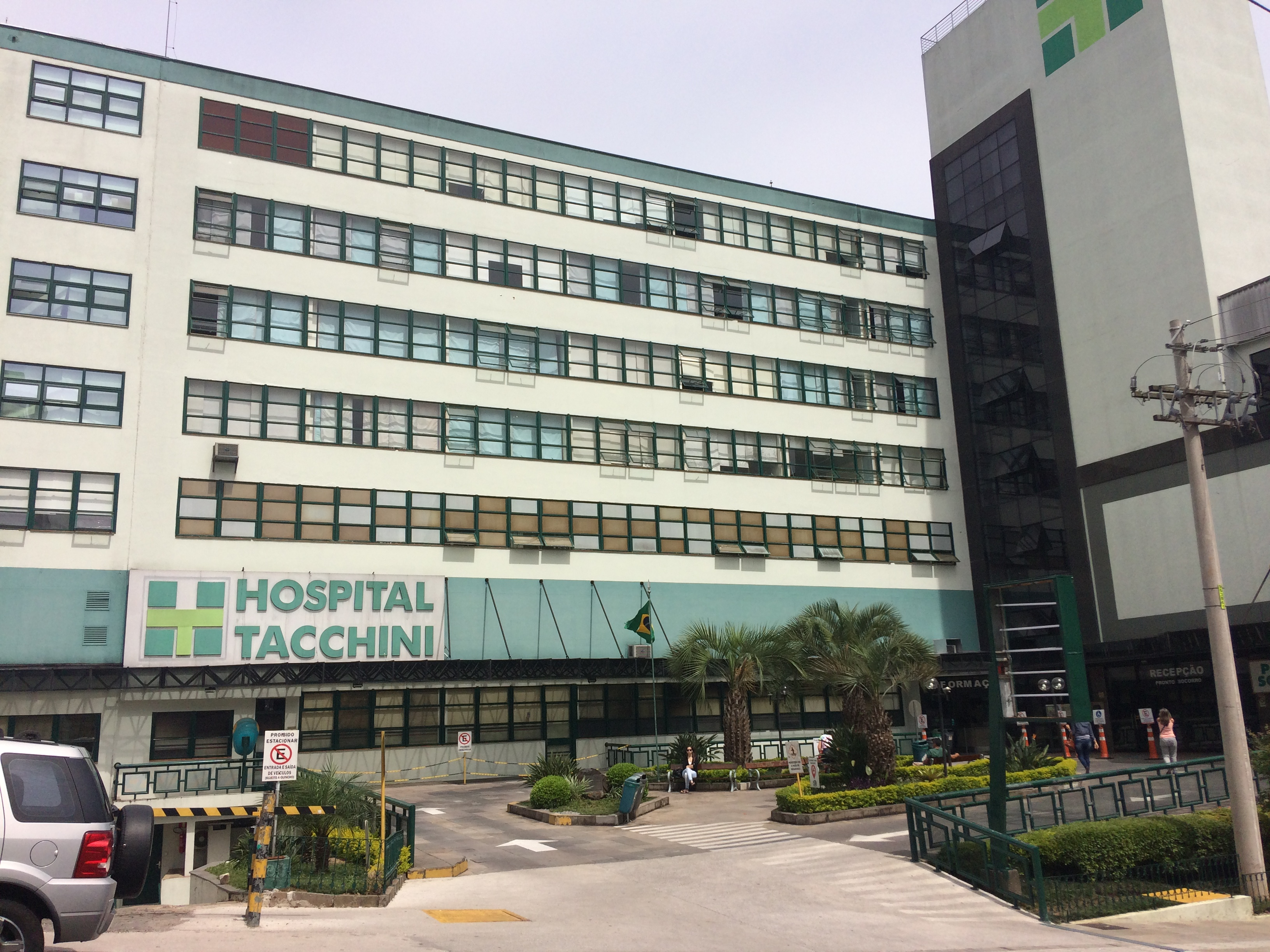 Hospital Tacchini em Bento Gonçalves